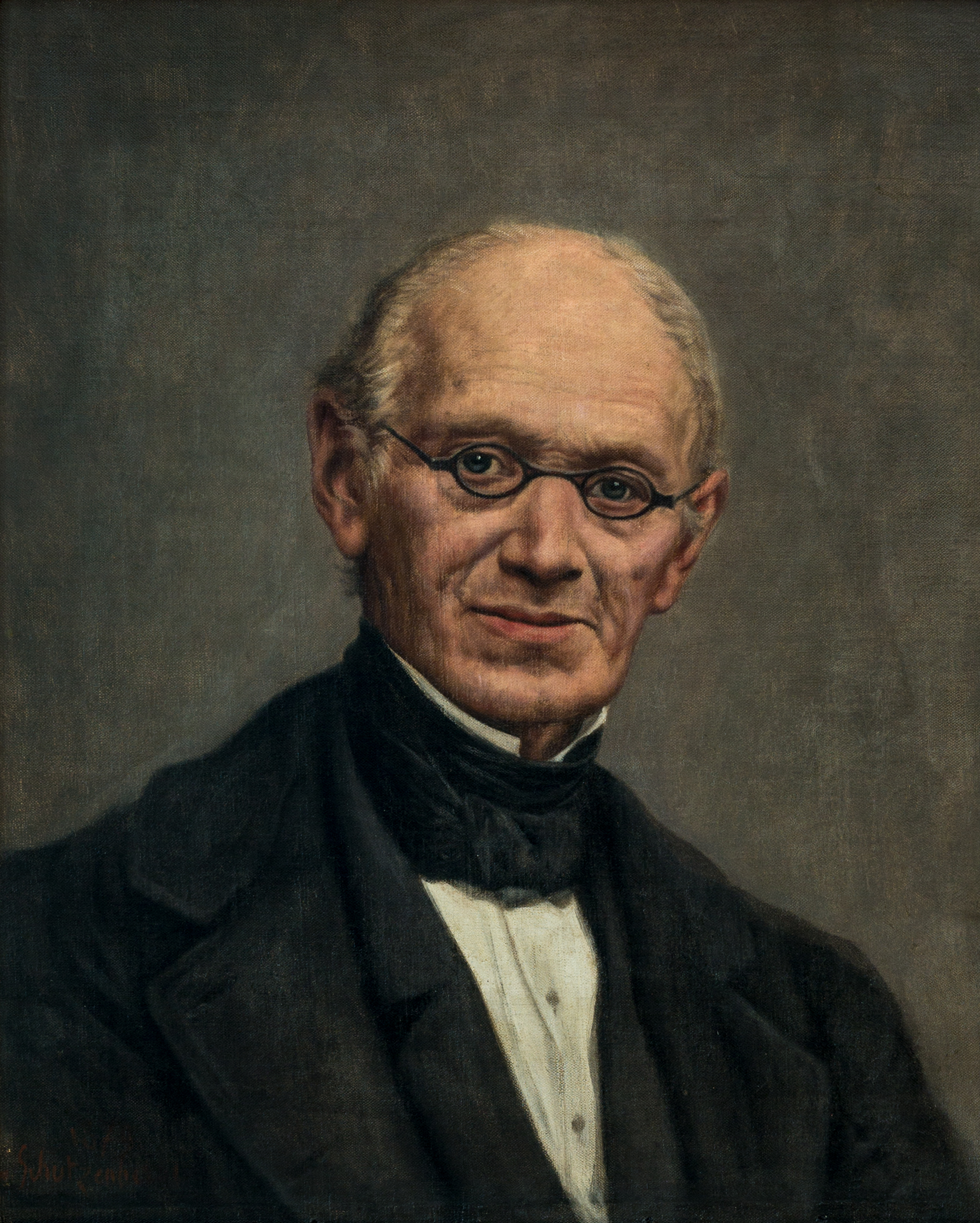 Édouard Reuss (1804-1891). Professeur au Séminaire et à la Faculté de Théologie de Strasbourg. Exégète de renom. Editeur des oeuvres de Calvin. Portrait peint à l'huile sur toile par Louis Frédéric Schützenberger. Collections du Chapitre de Saint-Thomas, Strasbourg, salle Koch